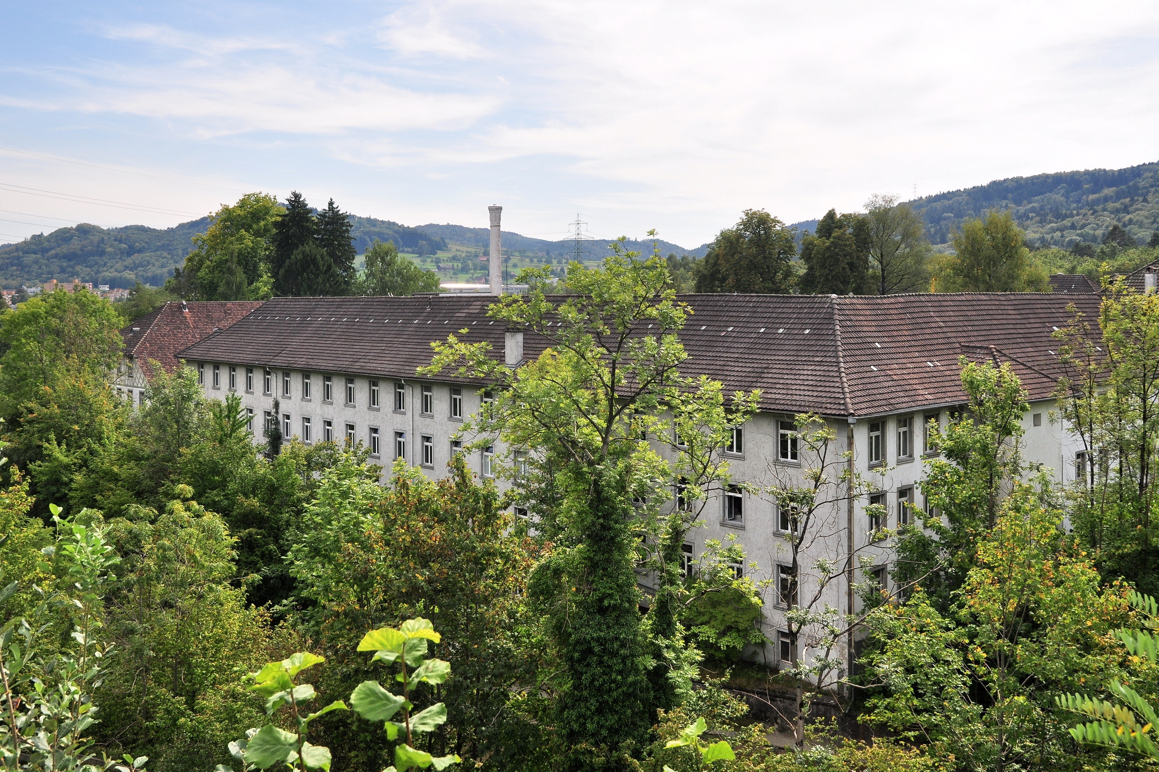 Ehemalige Spinnerei Hard, Hard 11 in Winterthur (Switzerland)